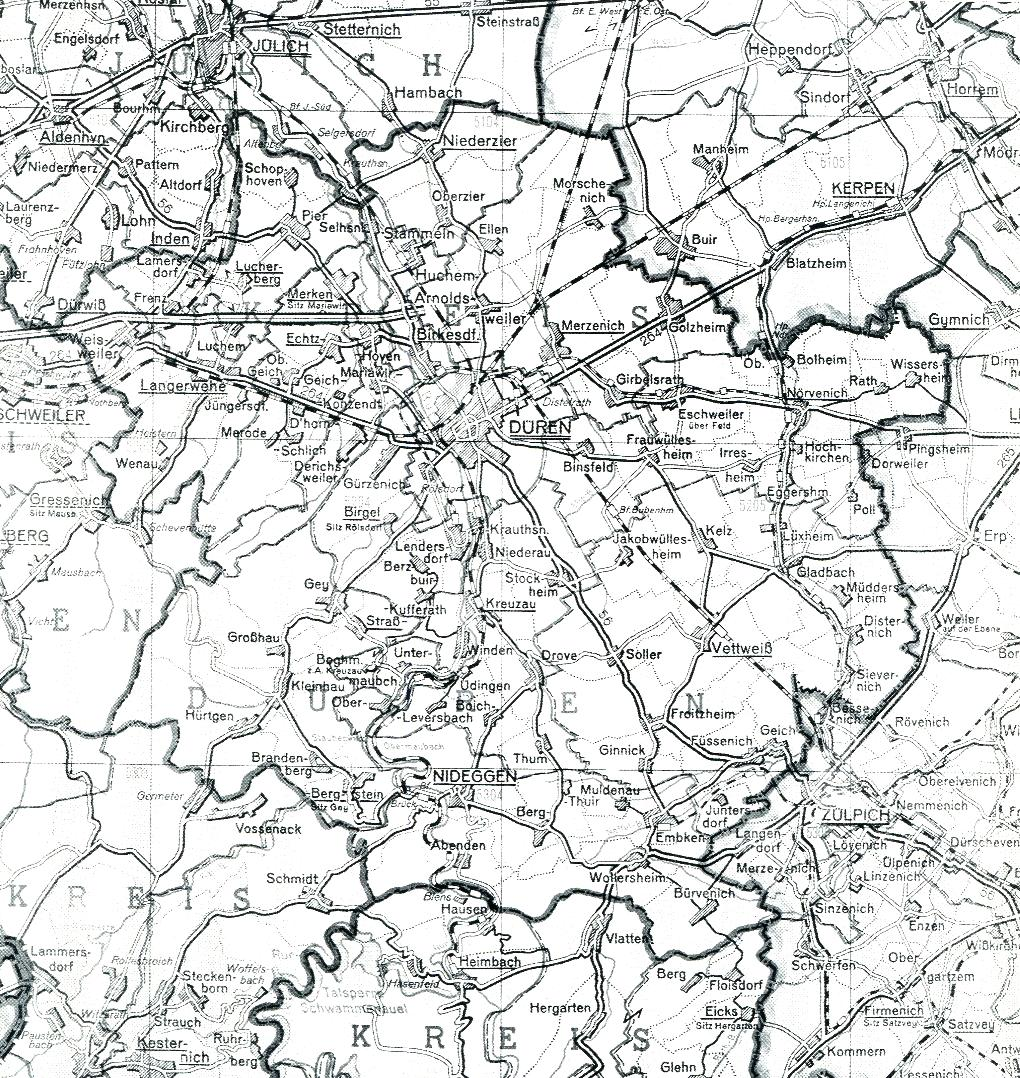 Karte des Kreises Düren bis 1972